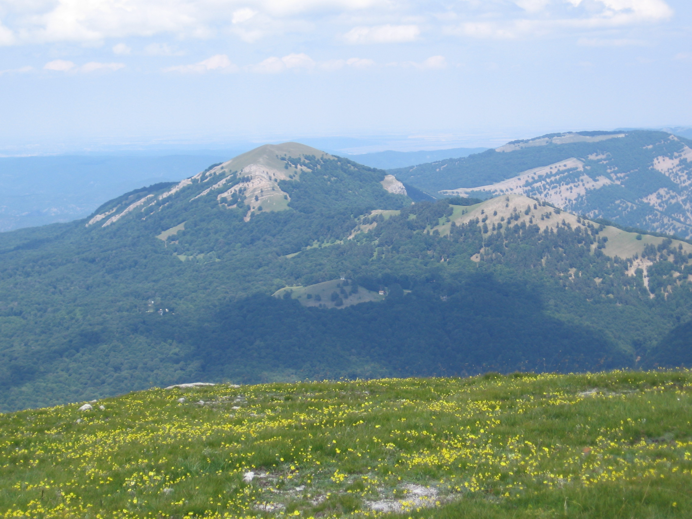 Фото